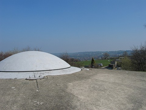 Blick von der östlichen Versenkkuppel nach Osten (Original text: Östliche Versenkkuppel mit Vorfeld)